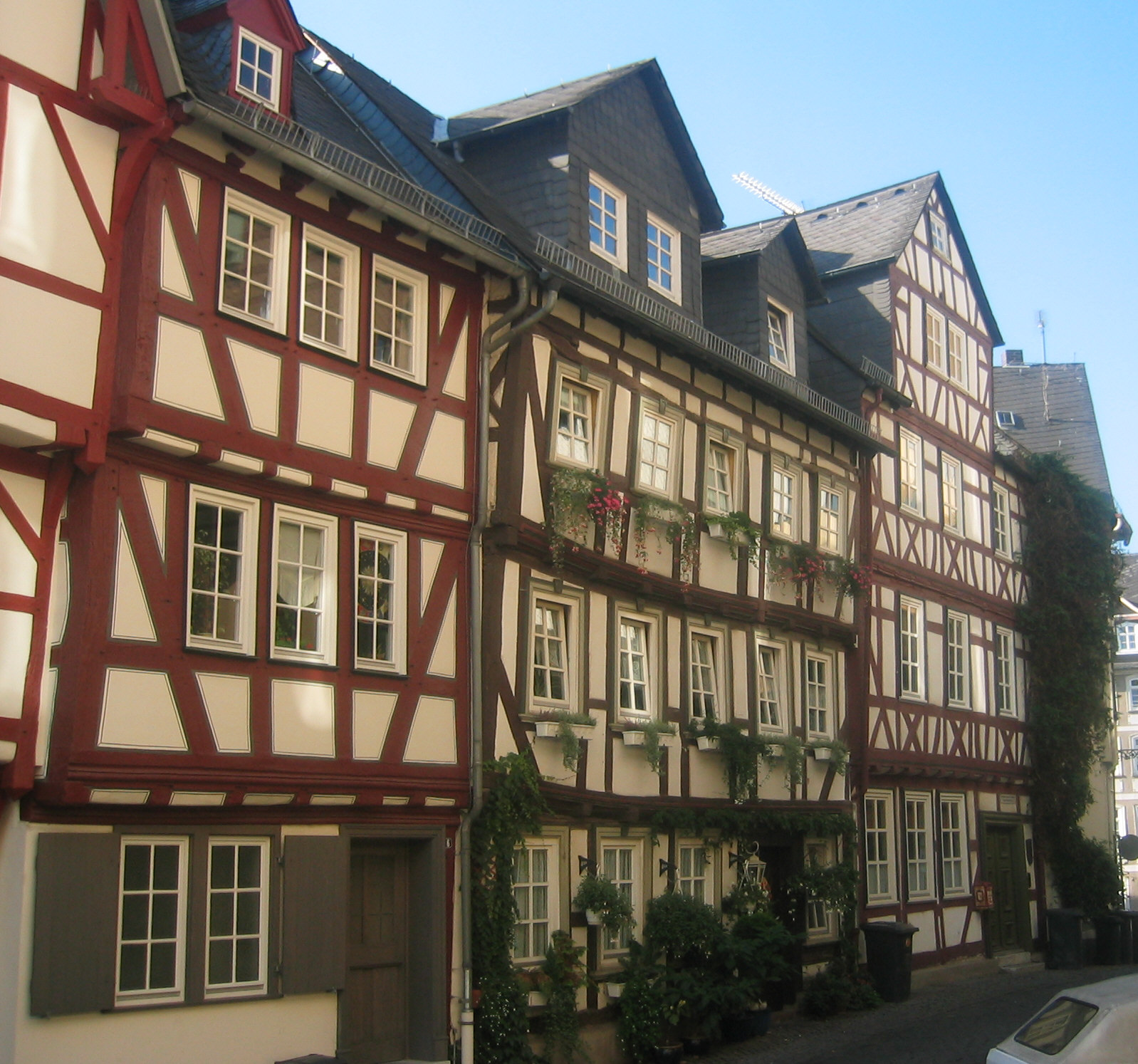 Wetzlar, Germany: Altstadt